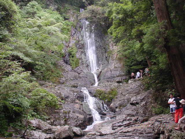 Sugao no taki waterfall, Kokura Minami ward, Kitakyushu. Photo taken by Ian Ruxton (Historian).